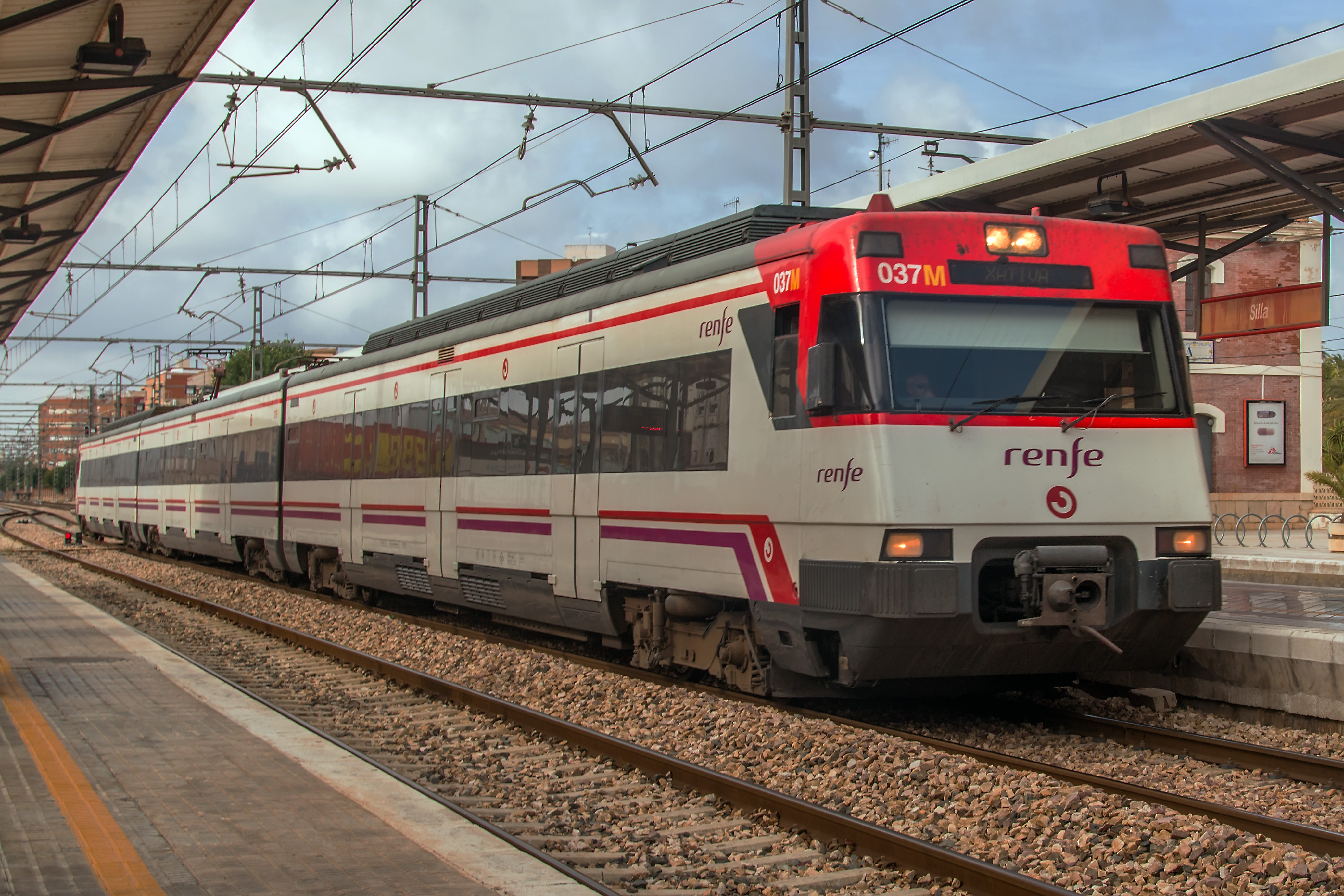 un Automotor eléctrico de la serie 447 de Renfe Operadora en la estación de Silla.